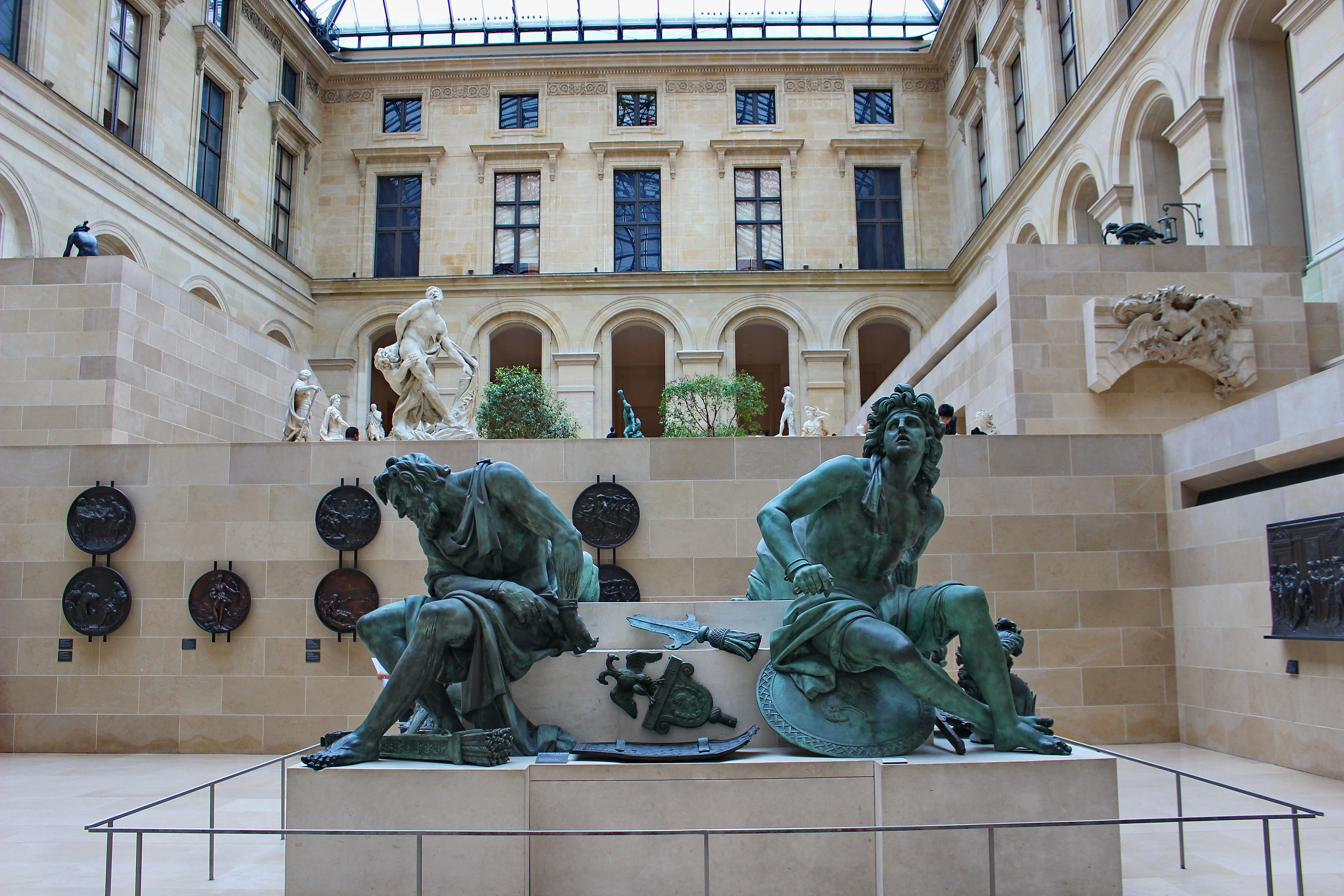 Louvre - Griechenlnd